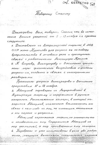 Записка министра МВД Игнатьева Сталину по "Делу врачей"